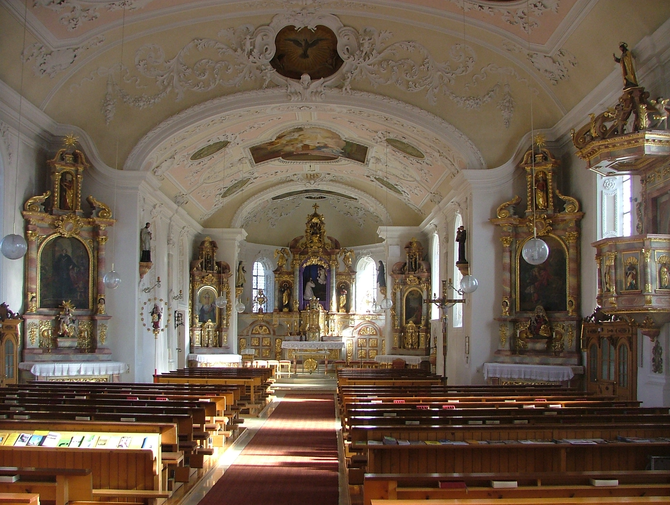 Durach